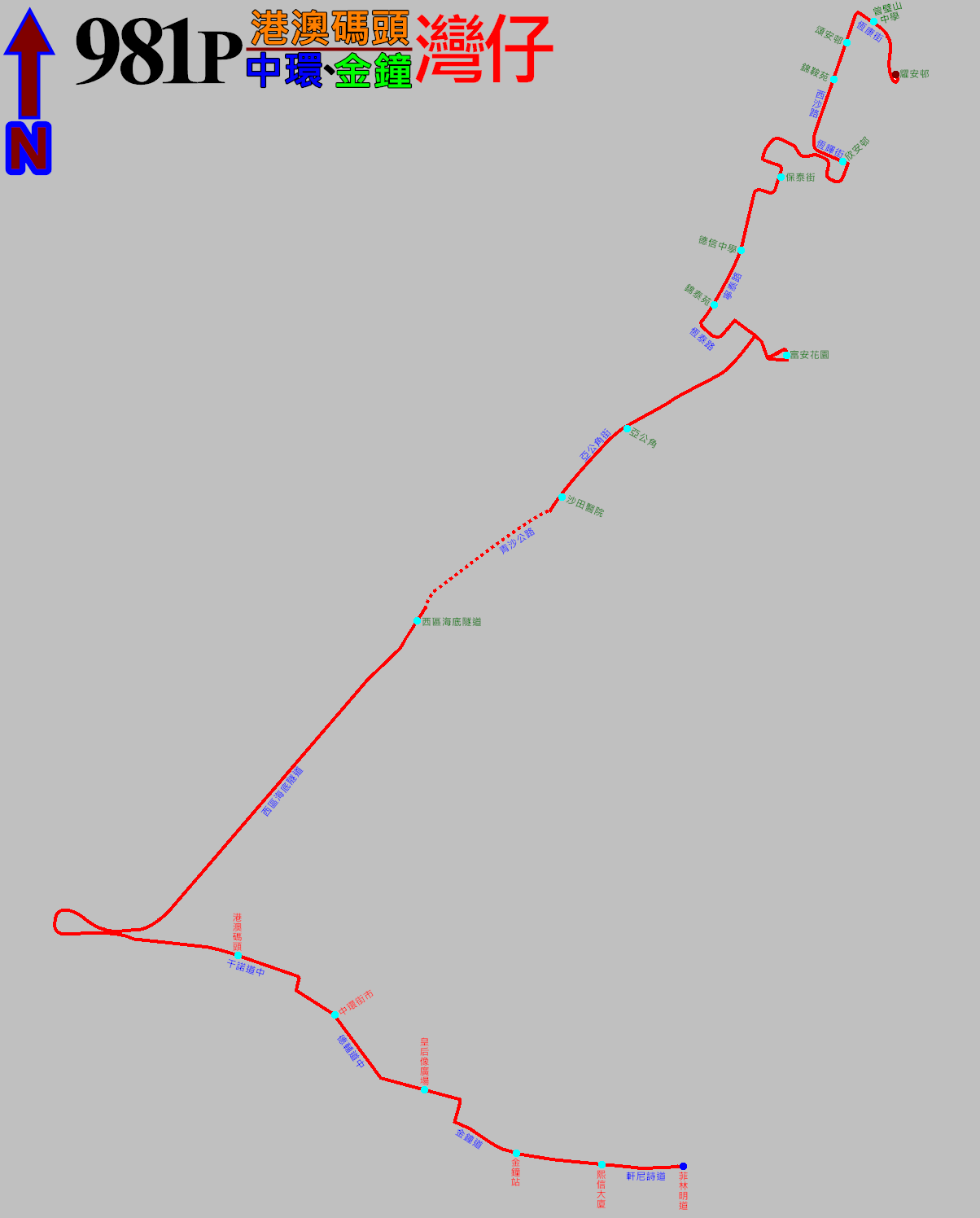 中文（香港）: 過海隧巴981P線早上班次的走線圖